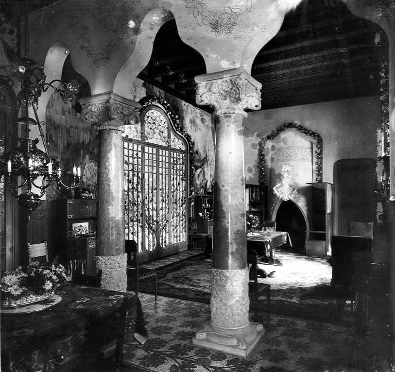 Interiores originales de la casa Trinxet con el mobiliario original diseñado y realizado por Gaspar Homar (1904). En primer pla dues columnes amb treball escultòric de Josep Maria Barnadas